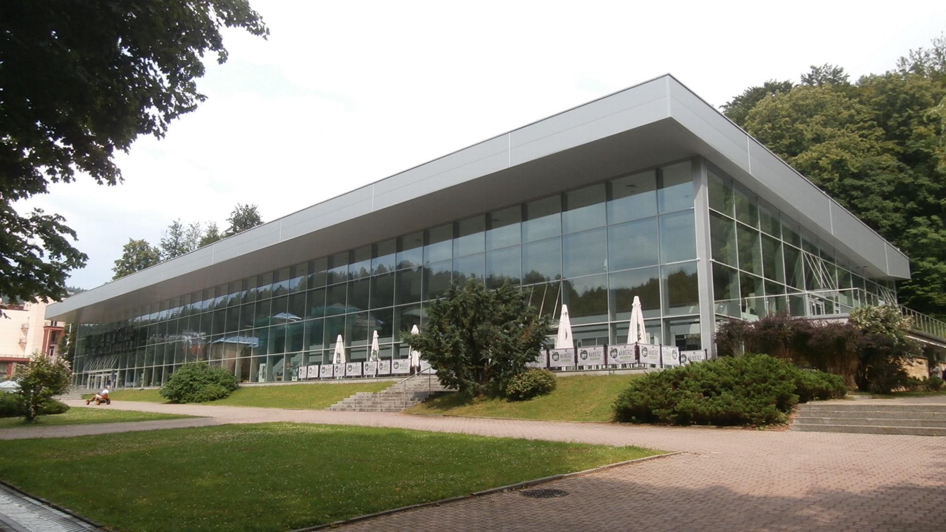 Pijalnia Główna w Krynicy-Zdroju, po remoncie - 2015